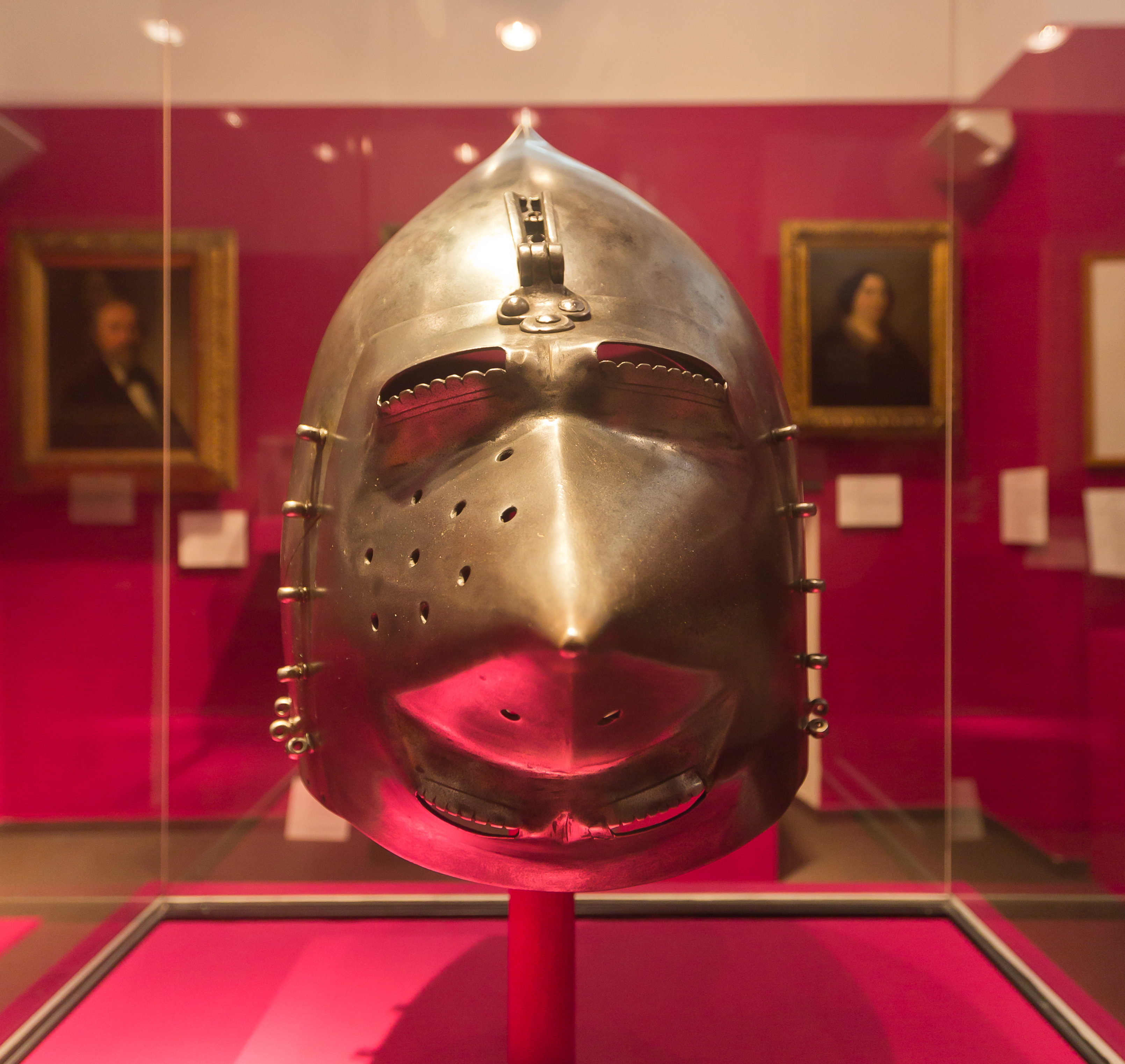 Kölnisches Stadtmuseum. Sonderausstellung in der Alten Wache zum 125. Geburtstag: „125 x gekauft - geschenkt - gestiftet“.